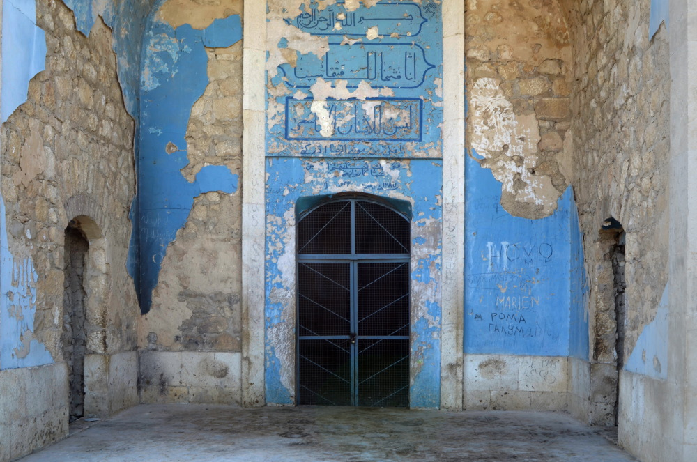 State of the Azerbaijani mosque (19th c.) in Agdam. Azerbaijan.